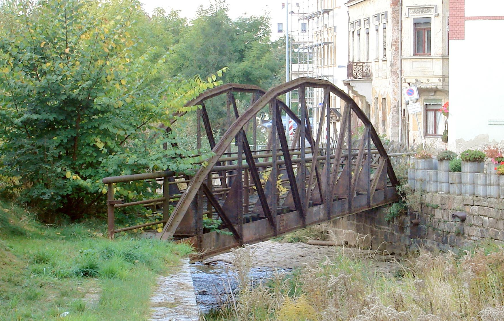 Sonnenbrücke der Schmalspurbahn Wilkau-Haßlau–Carlsfeld in Kirchberg